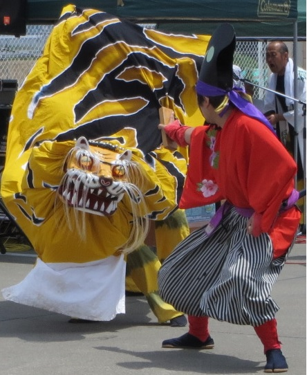 平成29年大槌郷土芸能祭における虎舞